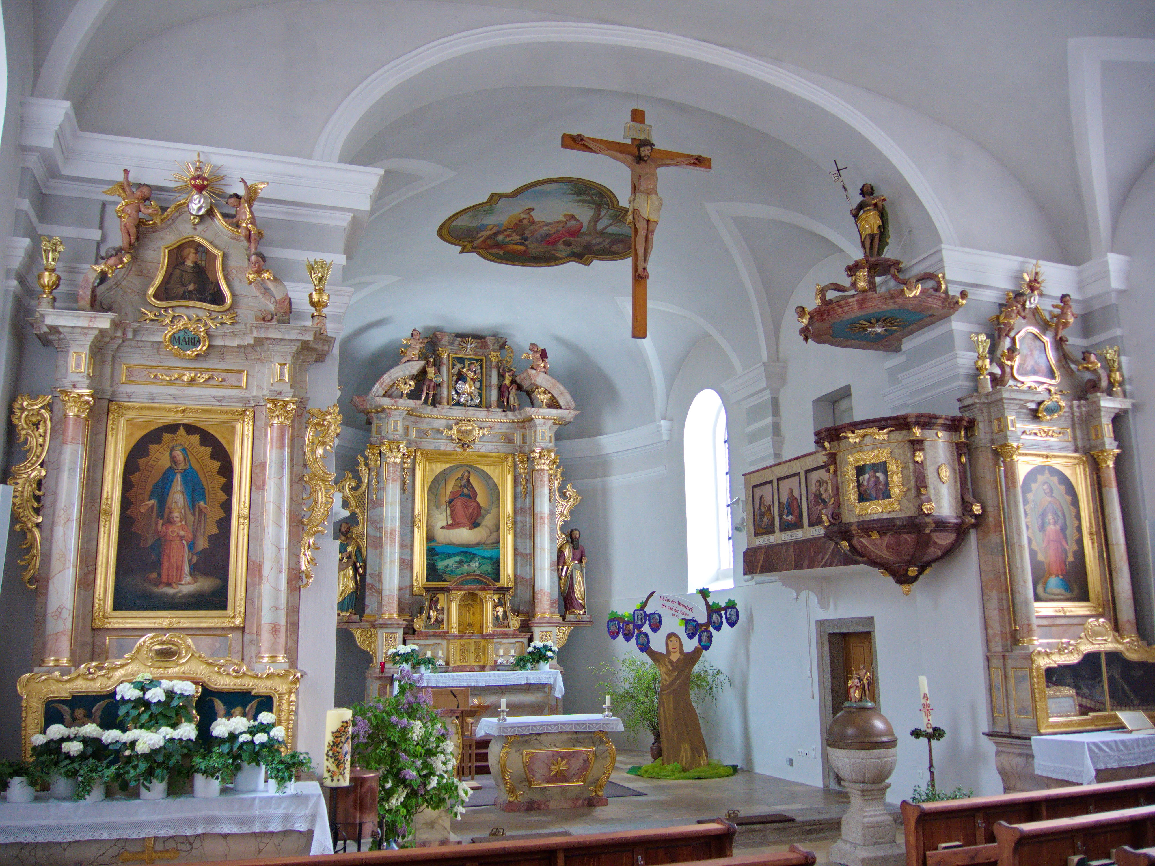 Hochaltar, Seitenaltäre und Kanzel der Pfarrkirche St. Jakobus in Achslach